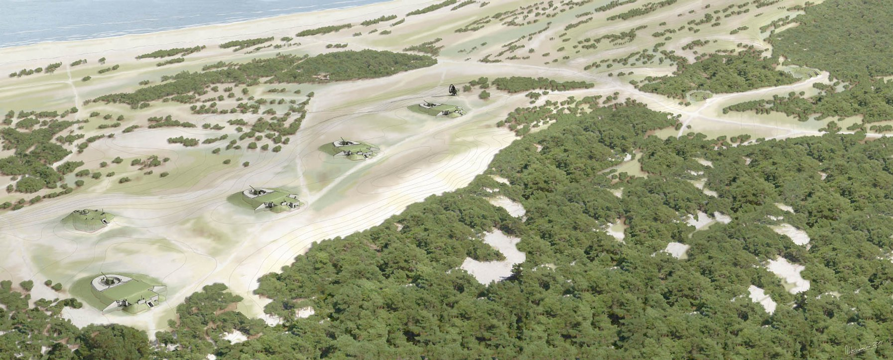 Plan Baterii Vineta autorstwa Arkadiusza Woźniakowskiego